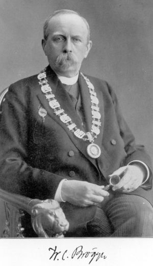 Norsk (bokmål): W. C. Brøgger, universitetsrektor, 1911